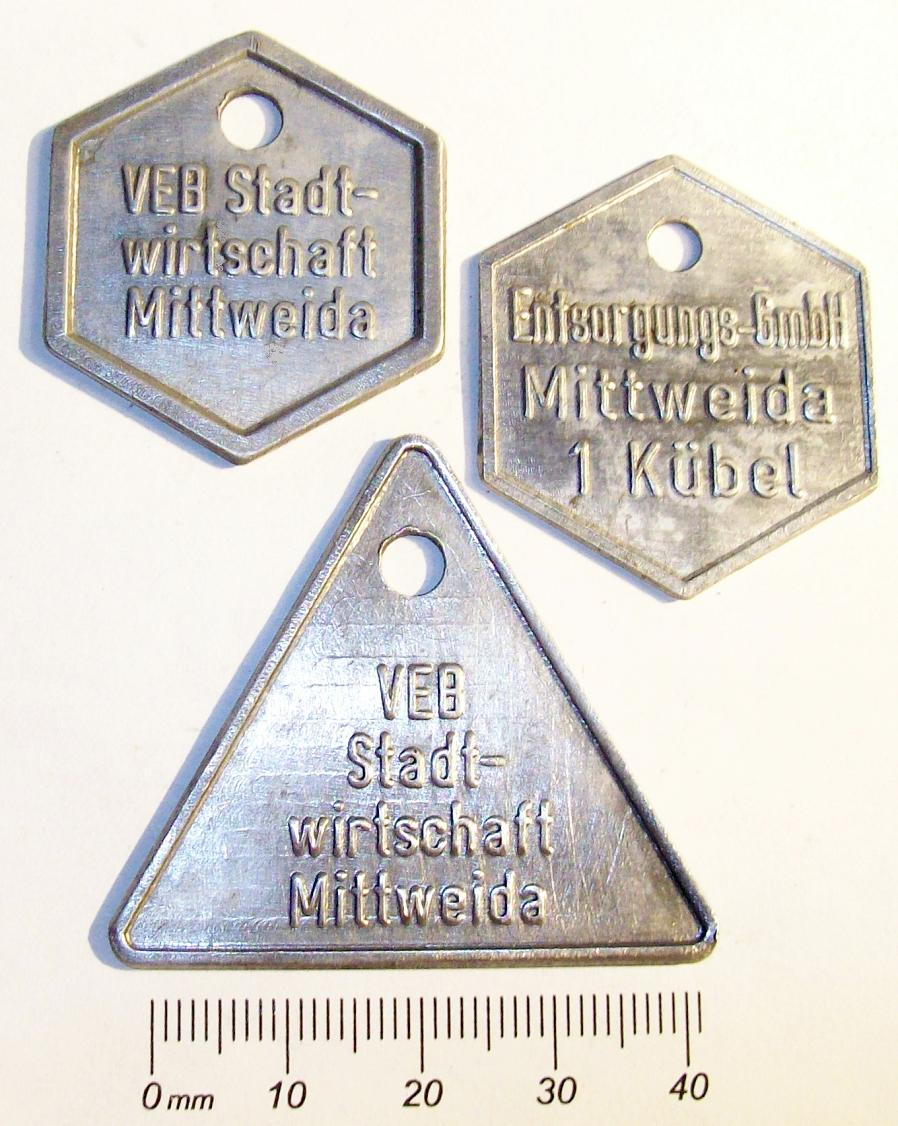 Müllmarken